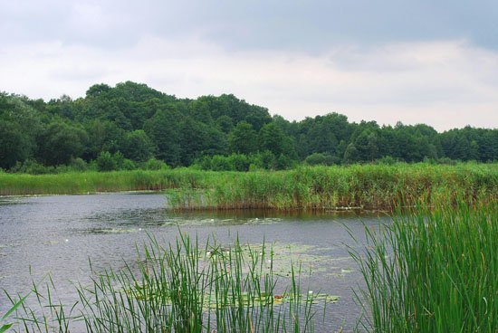 Голосіївський національний природний парк